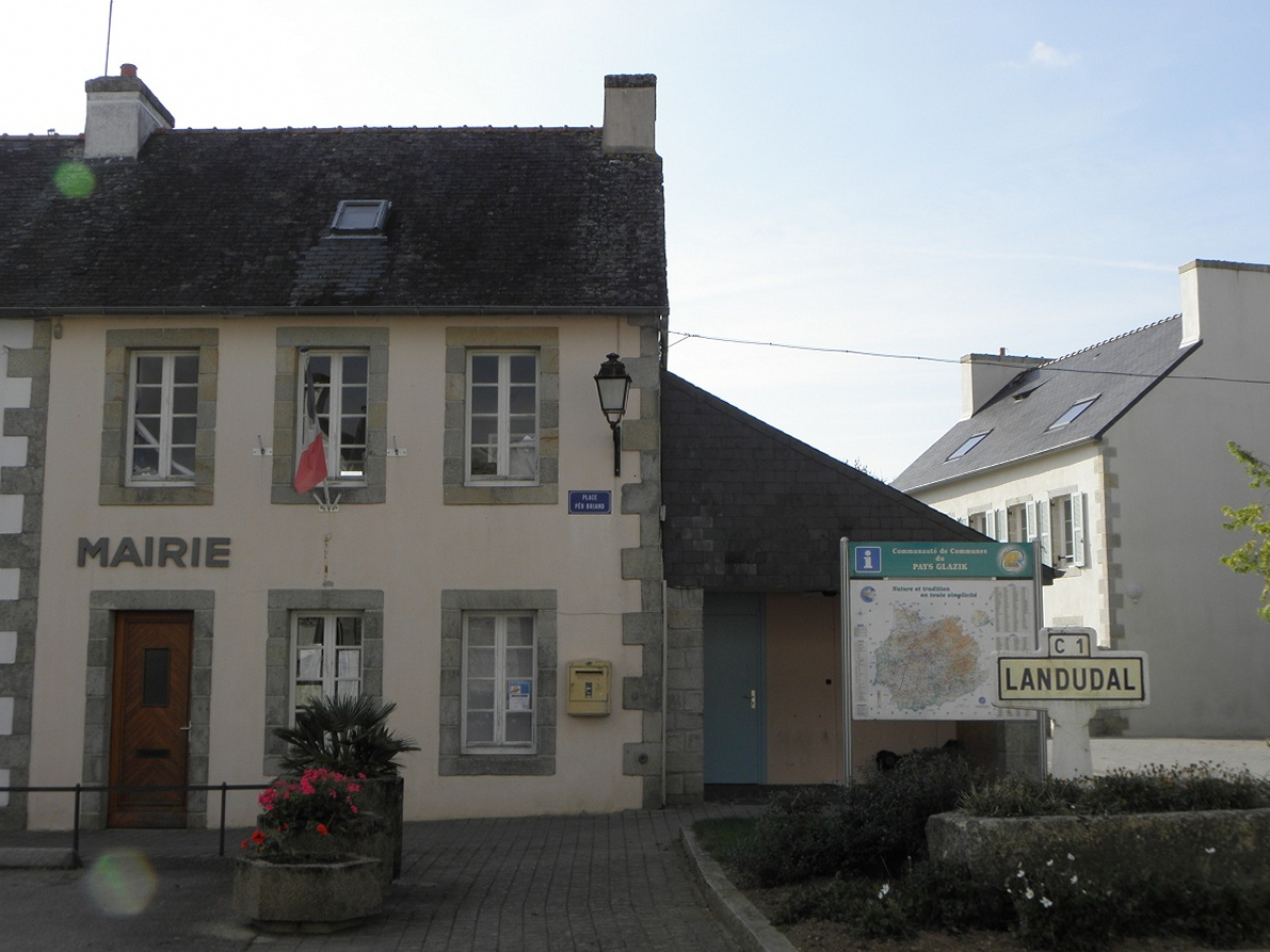 Mairie de Landudal (29).